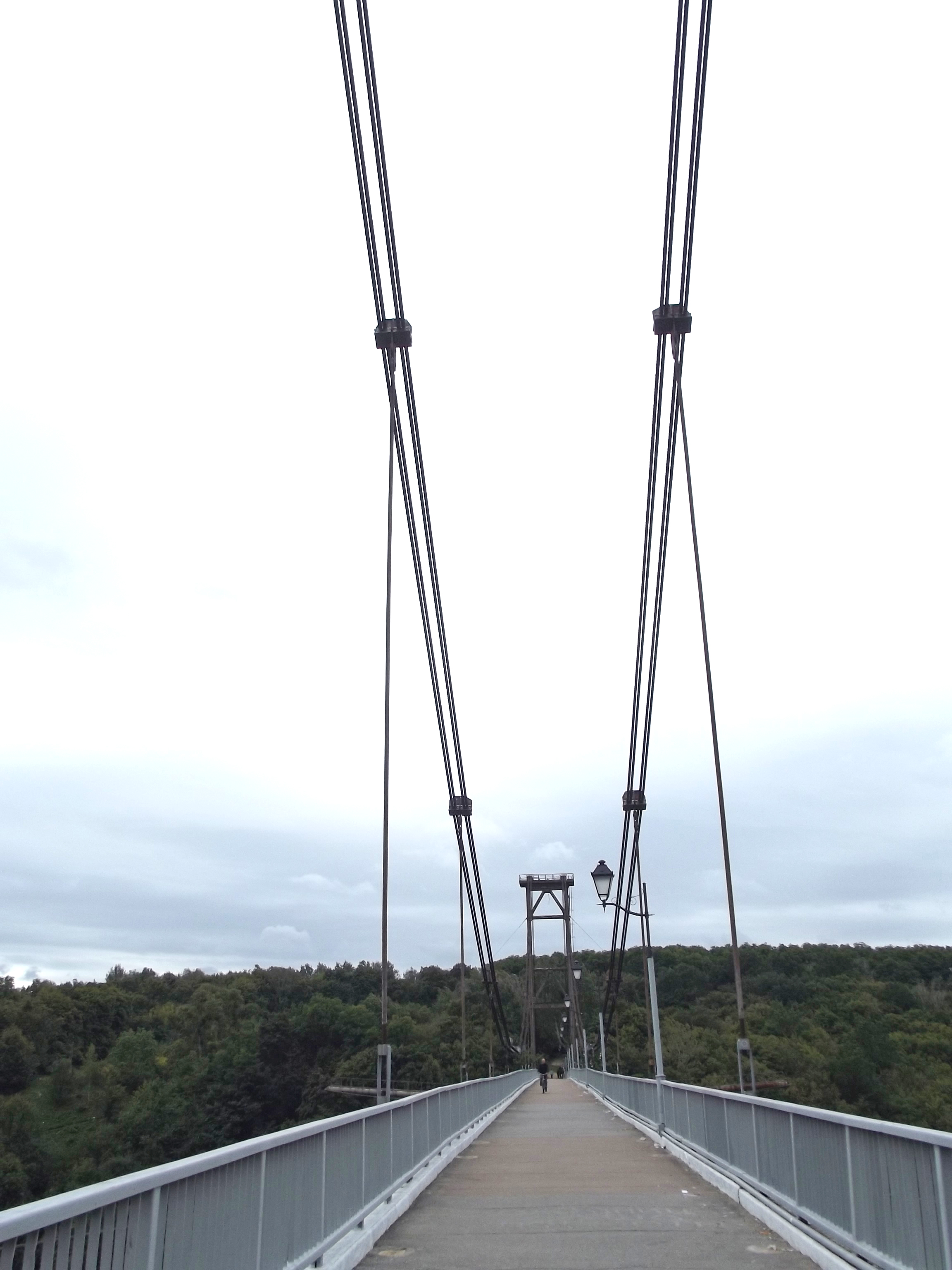 Пешеходный мост через реку Тетерев